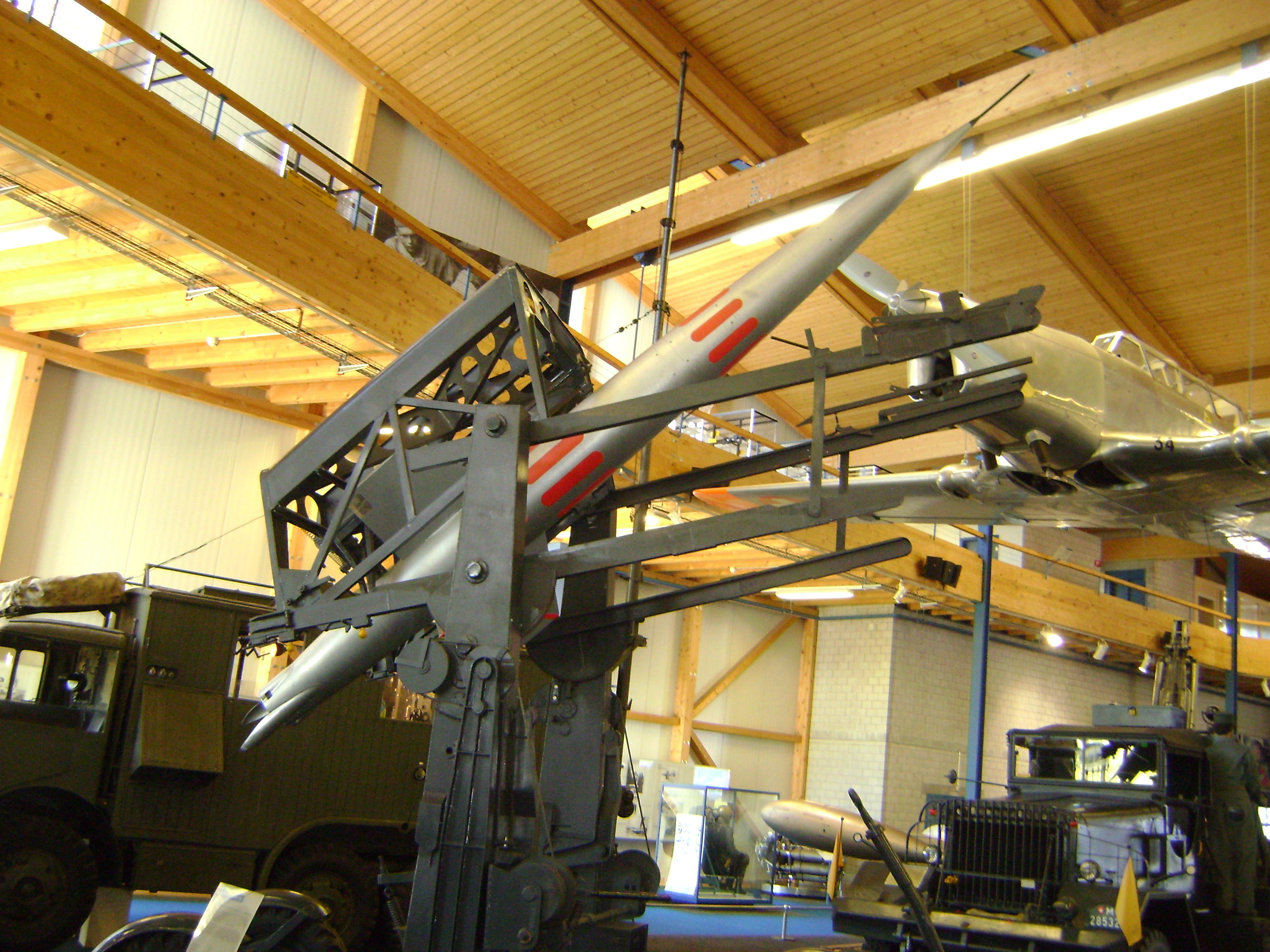 RSA Seite